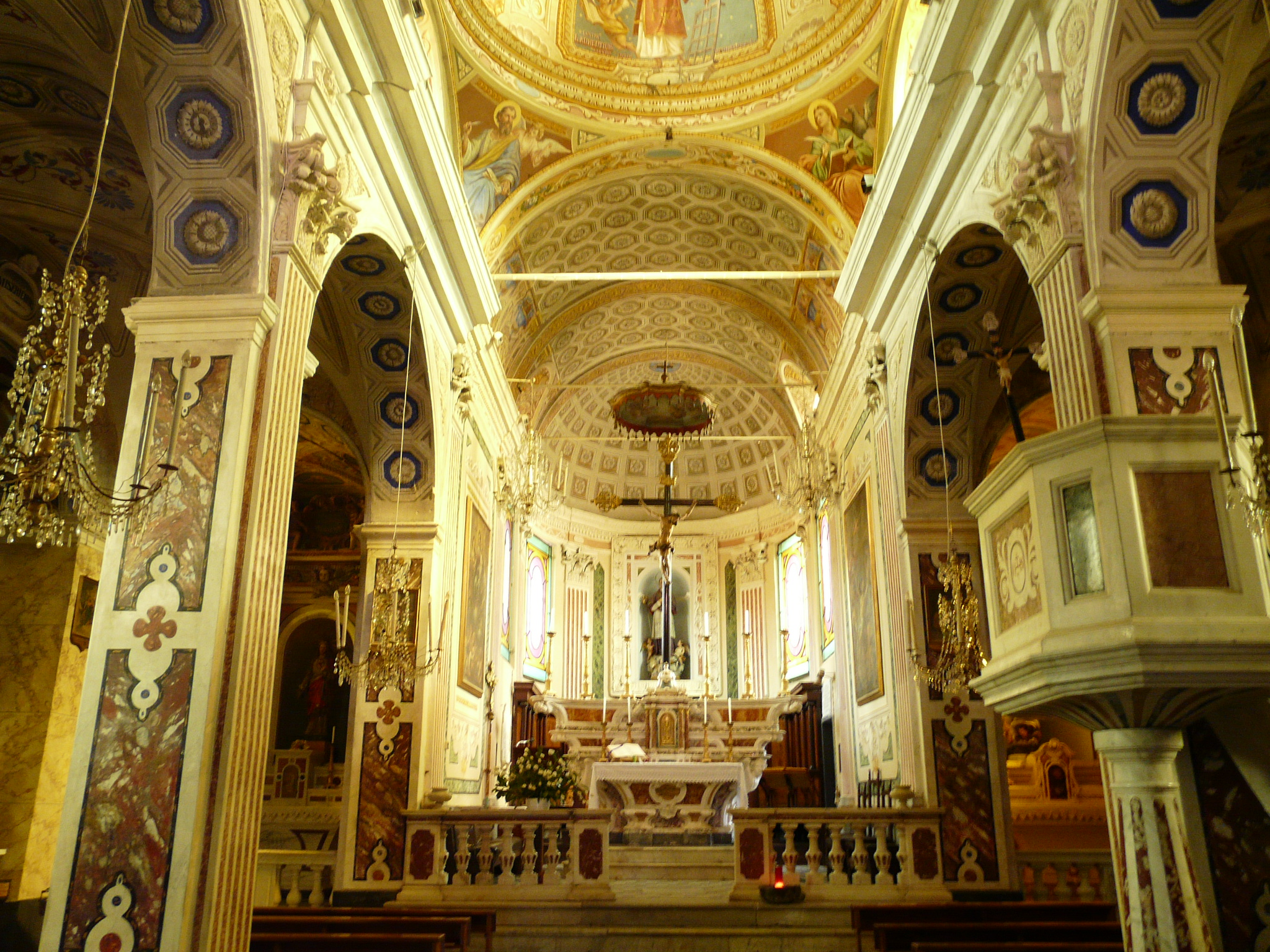 Chiesa di San Lorenzo martire, navata centrale, Carro, La Spezia, Liguria, Italia